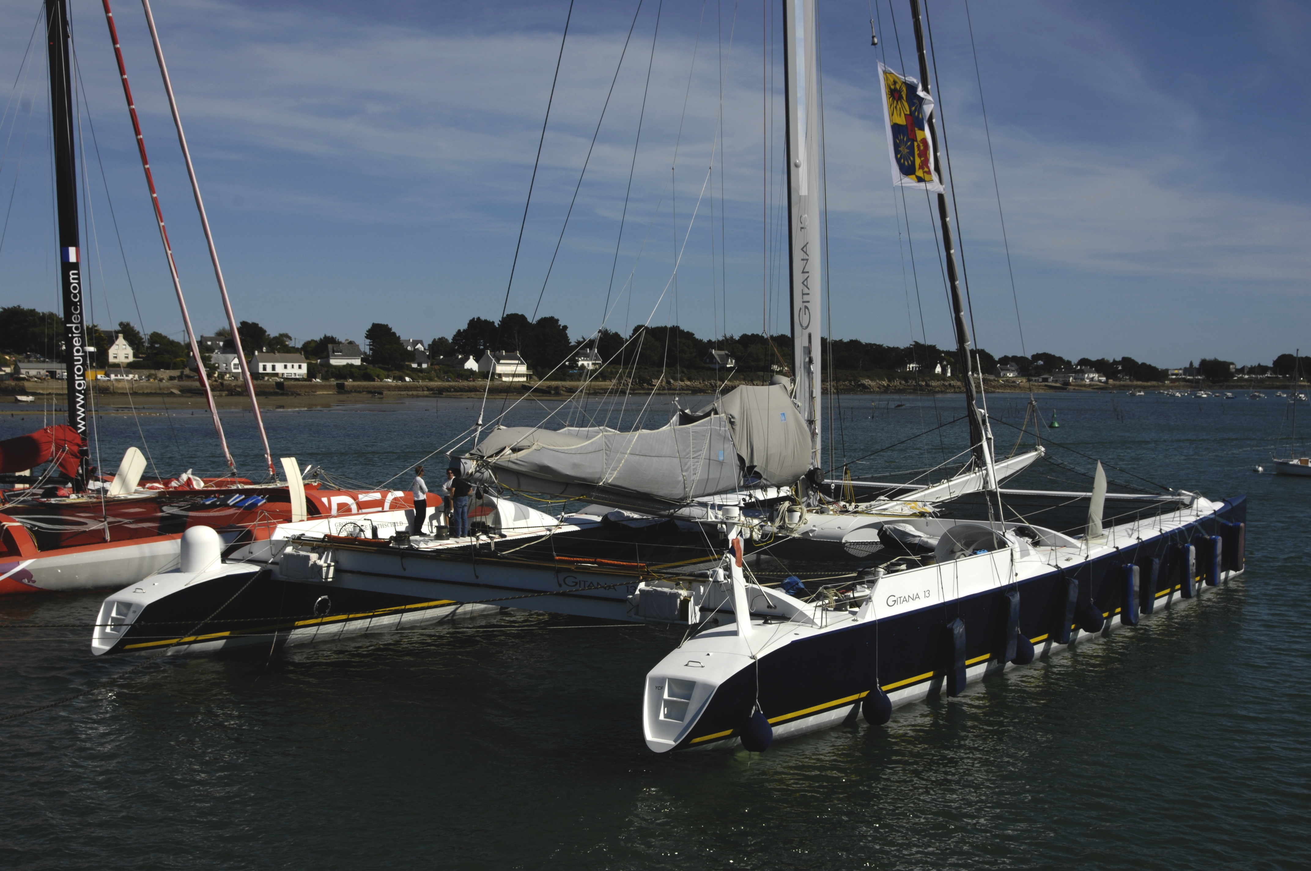 Trinite-sur-mer, Gitana 13, Max-catamaran, Bucht von Quiberon, Morbihan